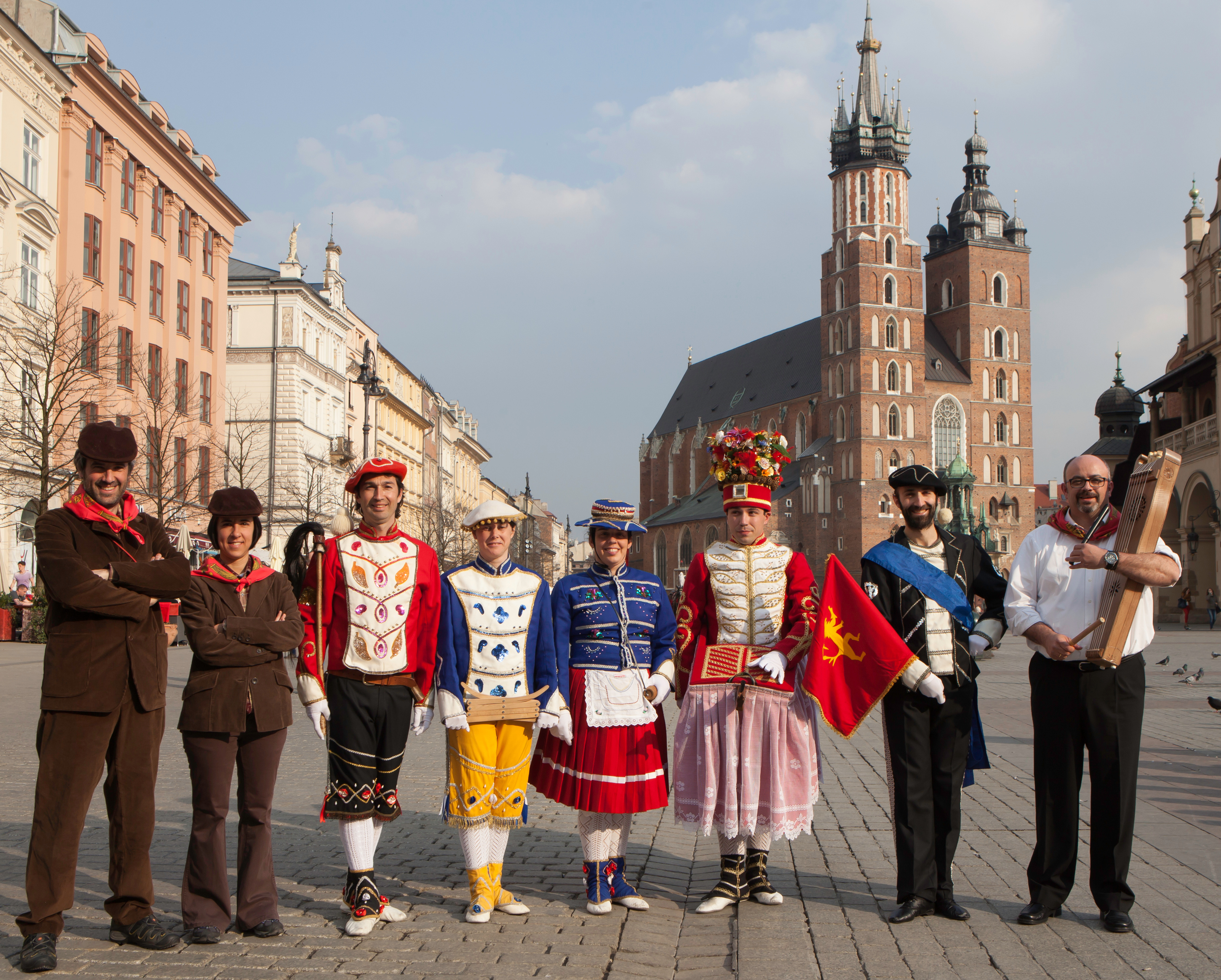 Krakovia, 2014-03-31. Lajkonik eta Zamaltzaina, Krakovian, Kezka dantza taldea. Argazkia: Iñaki Zugasti.